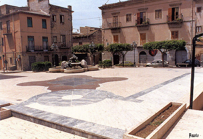 Piazza Aldo Moro di Campobello di Licata ideato e creato dall'artista Silvio Benedetto(Ag)